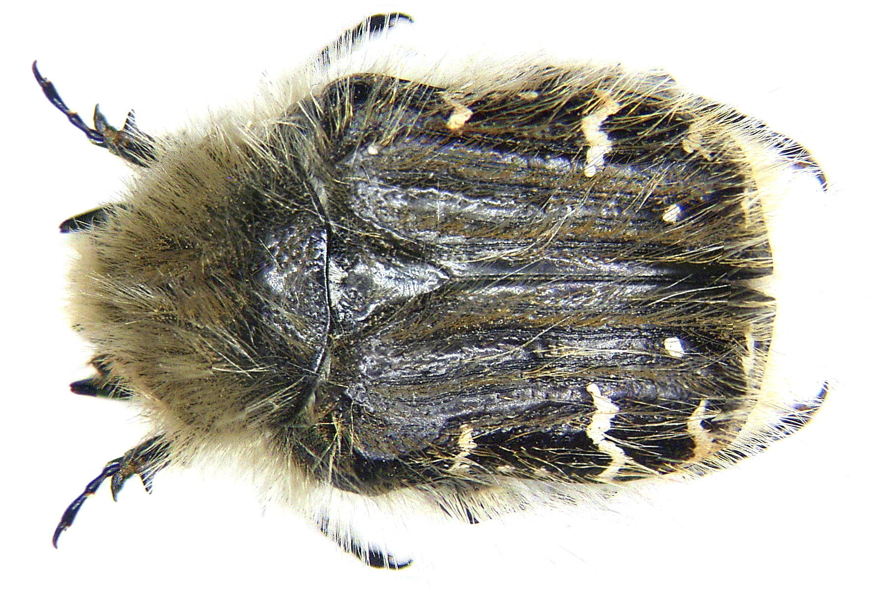 Familie: Scarabaeidae Groesse: 13 mm Verbreitung: Mittelasien Ökologie: Entwicklung im morschen Holz von Laubbäumen Fundort: Kasachstan, Kirgisisches Gebirge, Dschambul leg. V.Lukthanov, 1993; det. U.Schmidt Photo: U.Schmidt, 2006